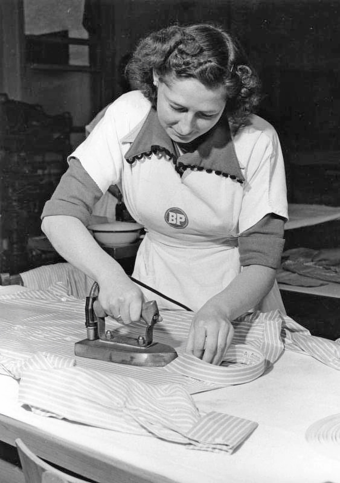 30.11.1953 Köln Textilfabrik Bierbaum-Proenen Hemden bügeln verlangt Übung und Erfahrung, ist aber auch Gefühlssache. Jedes Herrenhemd, jede Damenbluse der BP-Produktion gewinnt so die Aura des individuell Persönlichen. Die BP-Berufskleidung wird allerdings nicht von Hand sondern mittels der Bügelpresse geplättet und in Form gebracht. Die sogenannte Weißpresse ersetzt Bügeleisen und Bügelbrett zugleich.